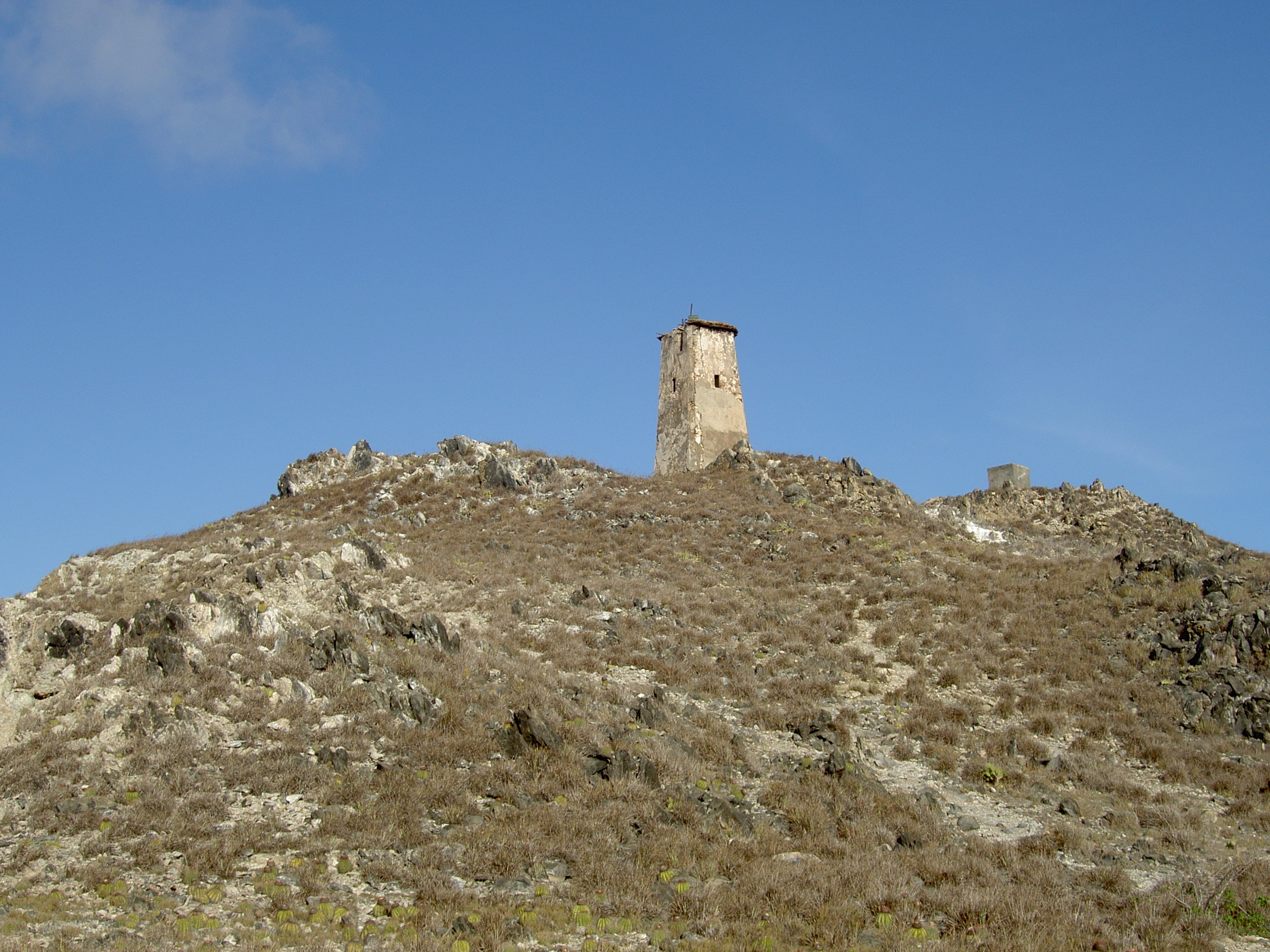 El viejo faro del Gran Roque, contruido entre 1870 y 1880 con piedras de coral y cal en la zona más alta y montañosa del archipiélago. Autor: Pedro Sánchez (PSE)